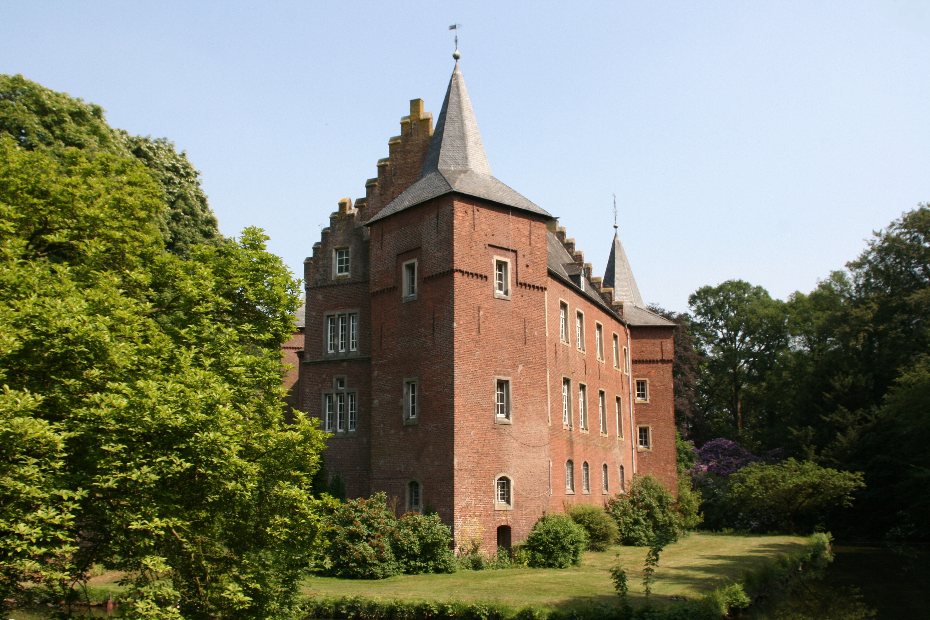 Schloss Elsum, Elsumer Weg in Wassenberg